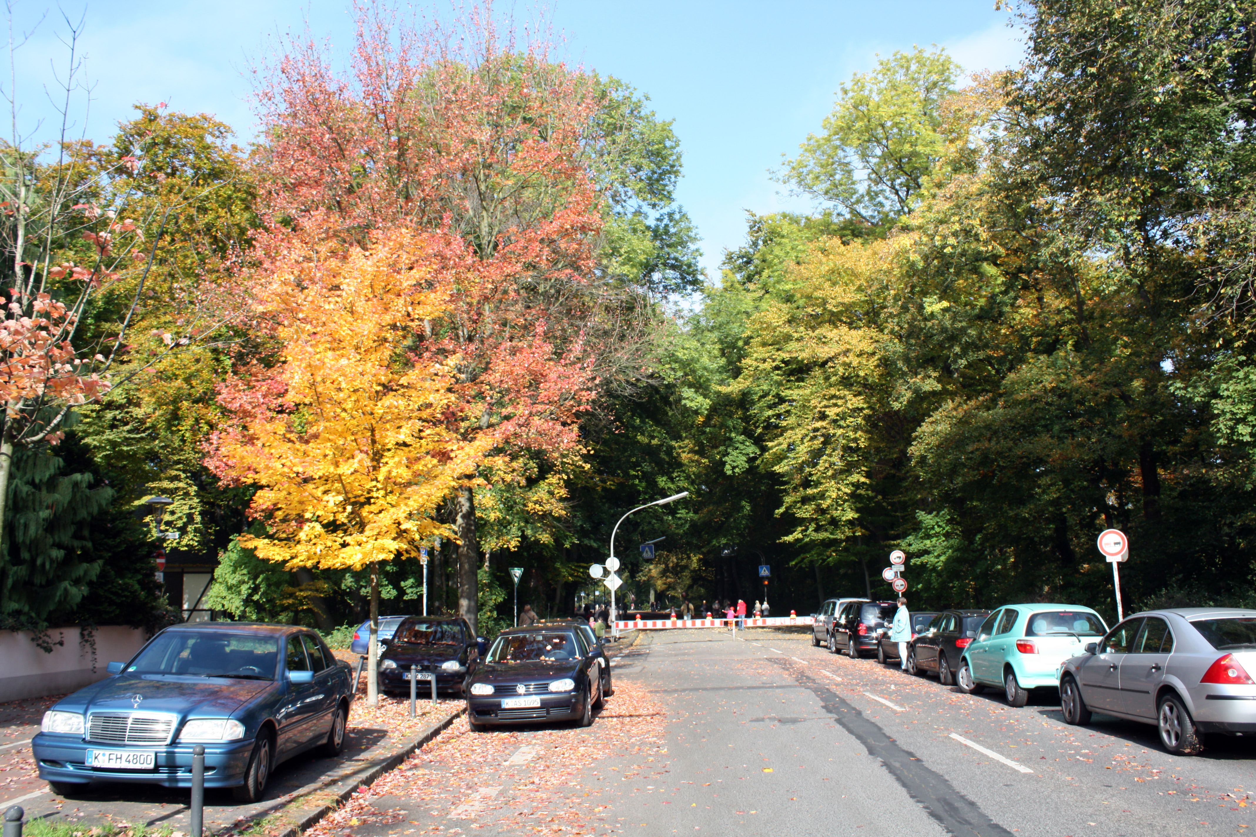 Köln-Lindenthal, Fußgängerzone Kitschburger Straße an Wochenenden